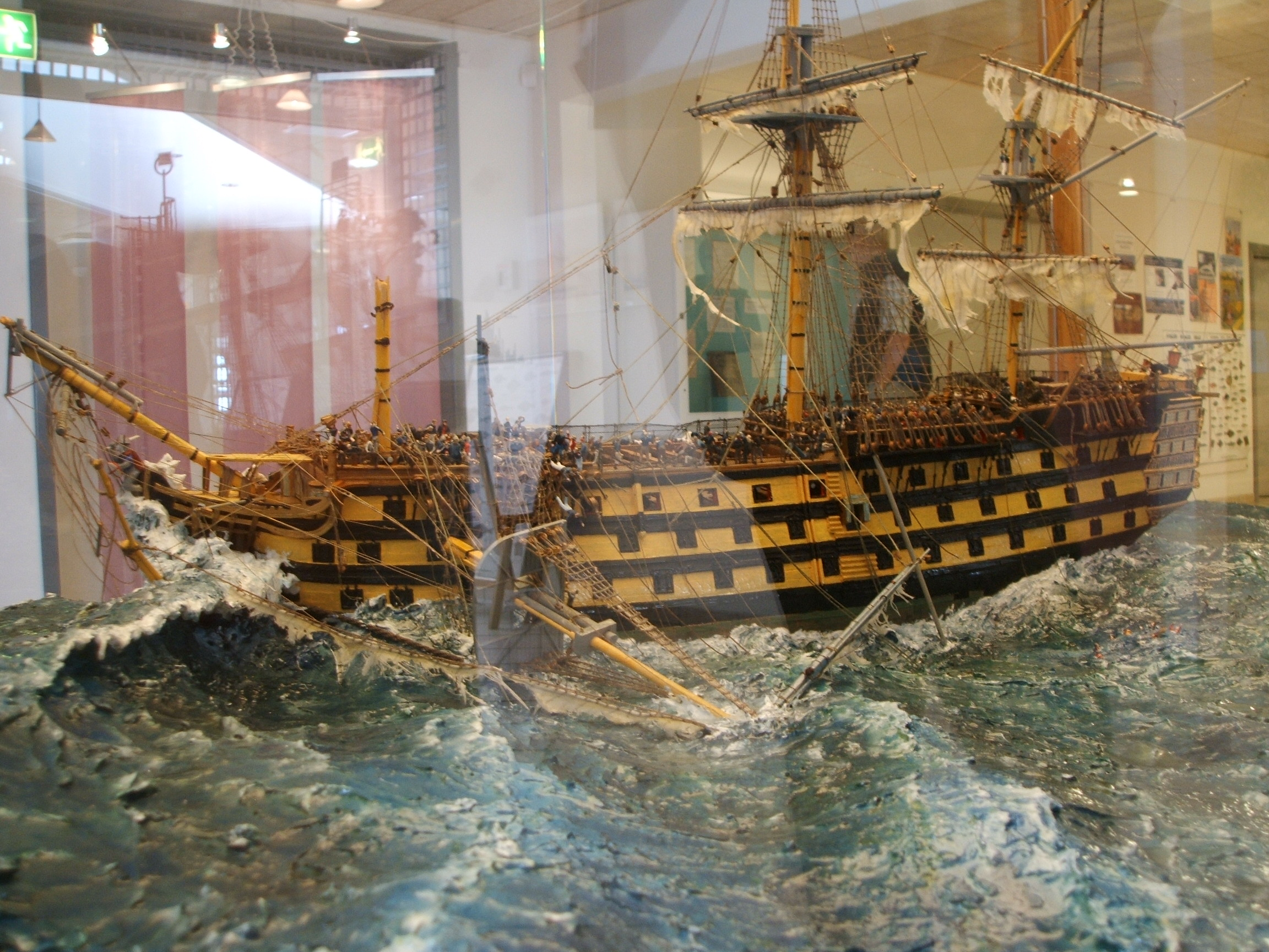 Diorama der Sturmfahrt der HMS St. George 1811